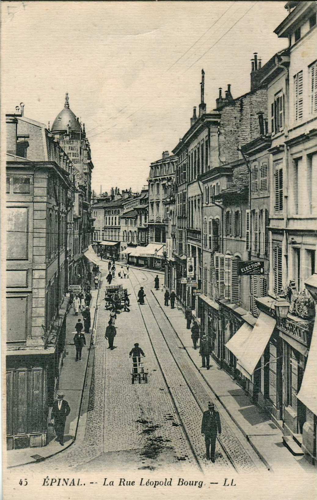 Carte postale ancienne éditée par LL, n°45 : ÉPINAL - La rue Léopold-Bourg